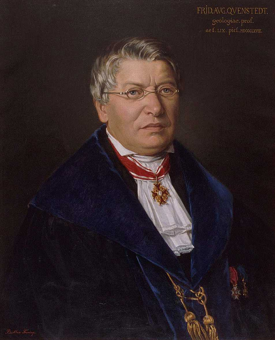 Prof. Dr. Friedrich August Quenstedt im Ornat als Rektor der Eberhard Karls Universität Tübingen (Gemälde aus dem Jahre 1868).